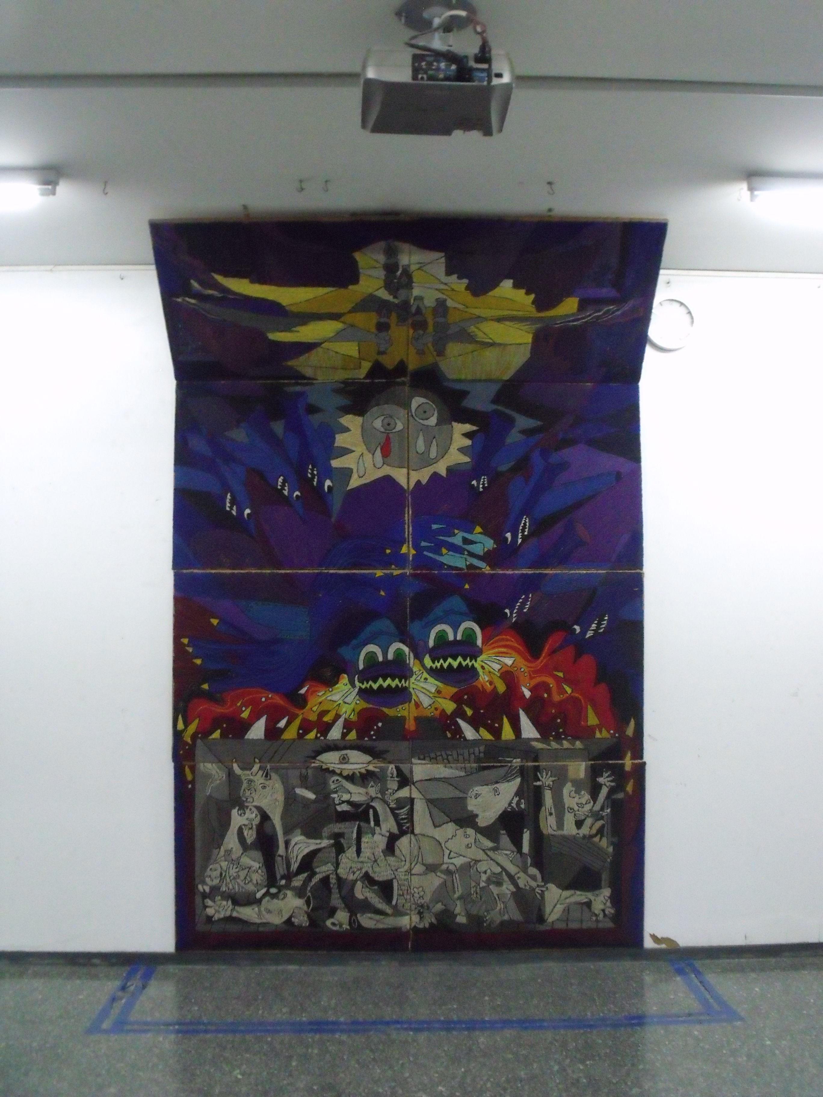 Tapiz formado por nueve tablas realizado en 1981 por el Equipo Hoz del instituto Juan de Garay de Valencia